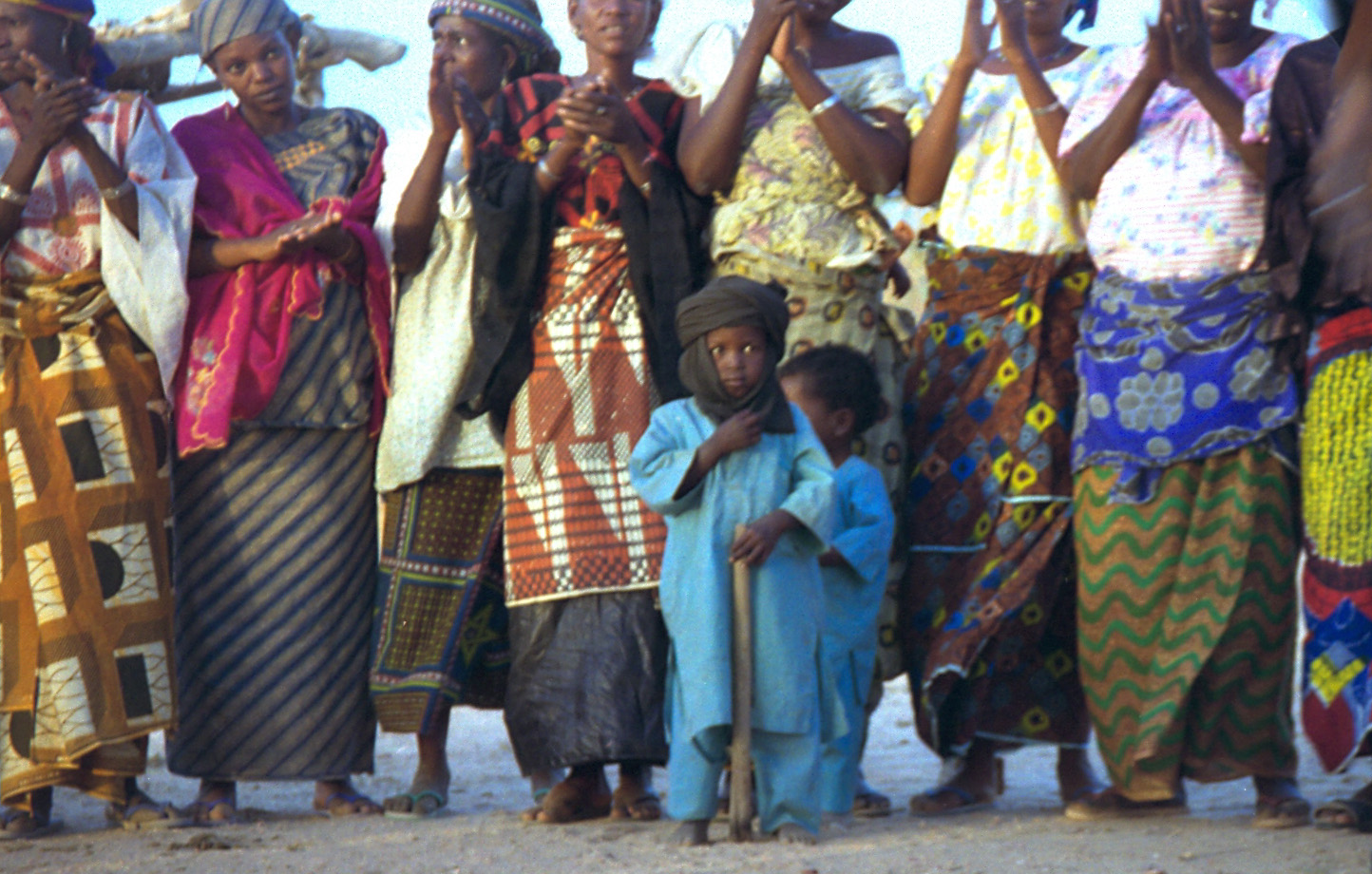 Tuareg women and children. Niger 1997.1997 #278-2 Tuareg